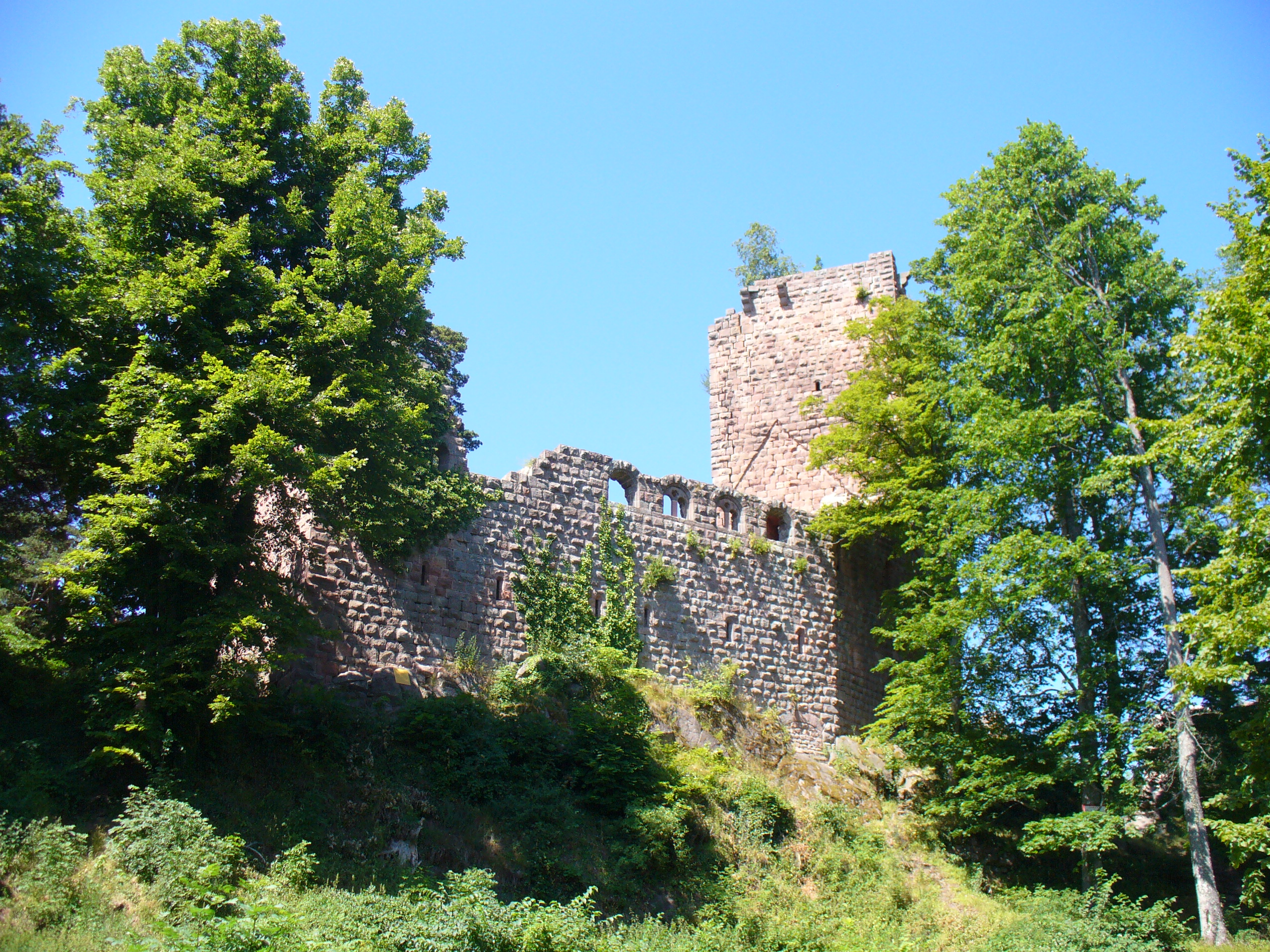 Summary Bildbeschreibung: Burg Landesberg im Elsass, Ostansicht Quelle: eigene Fotografie Fotograf/Zeichner: Thorsten Schlachter Datum: 02.07.2006